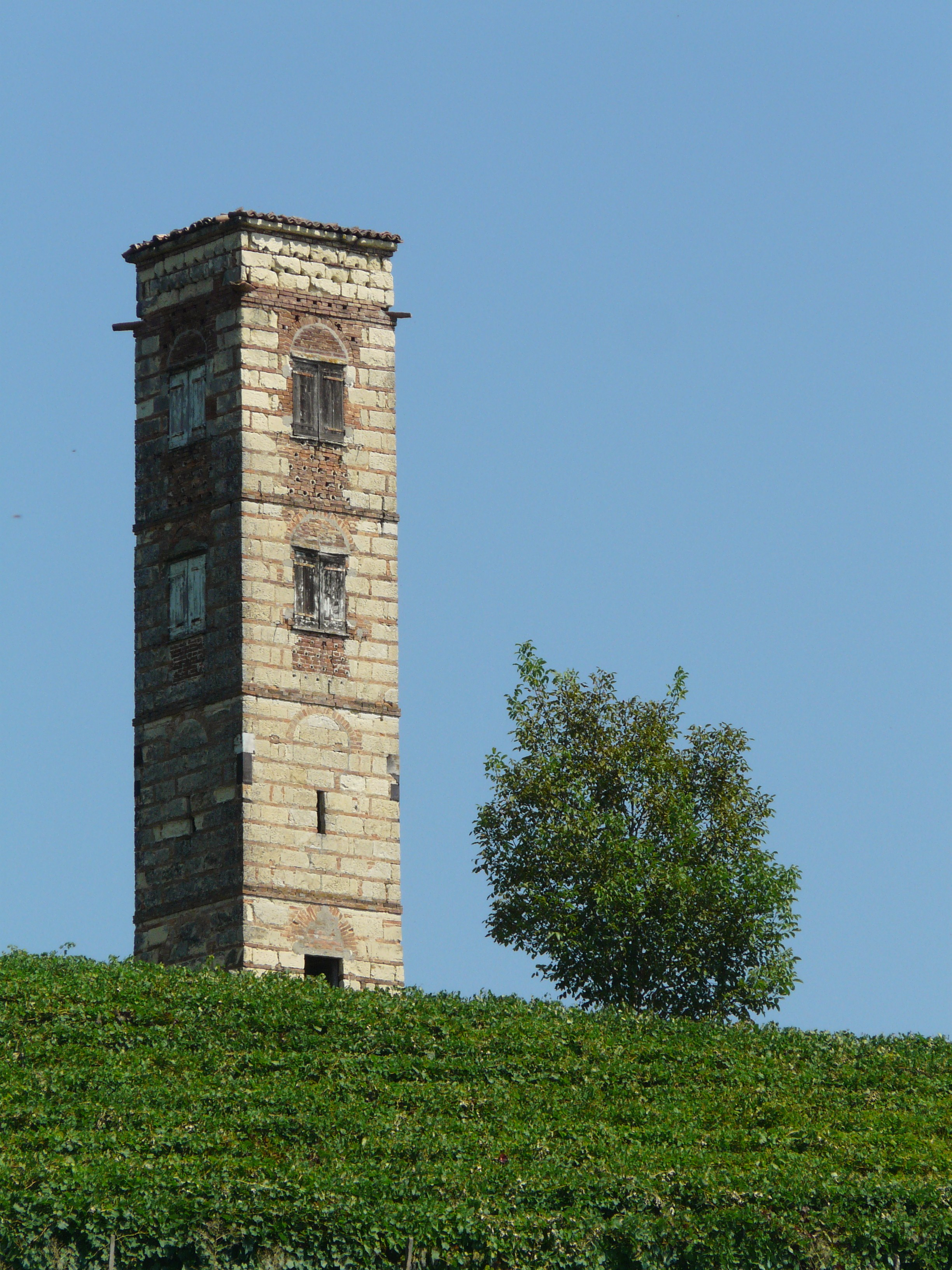 Torre presso Casorzo, Piemonte, Italia